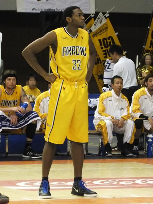 ニカ・ウィリアムスNyika Williams選手 高松ファイブアローズ在籍時